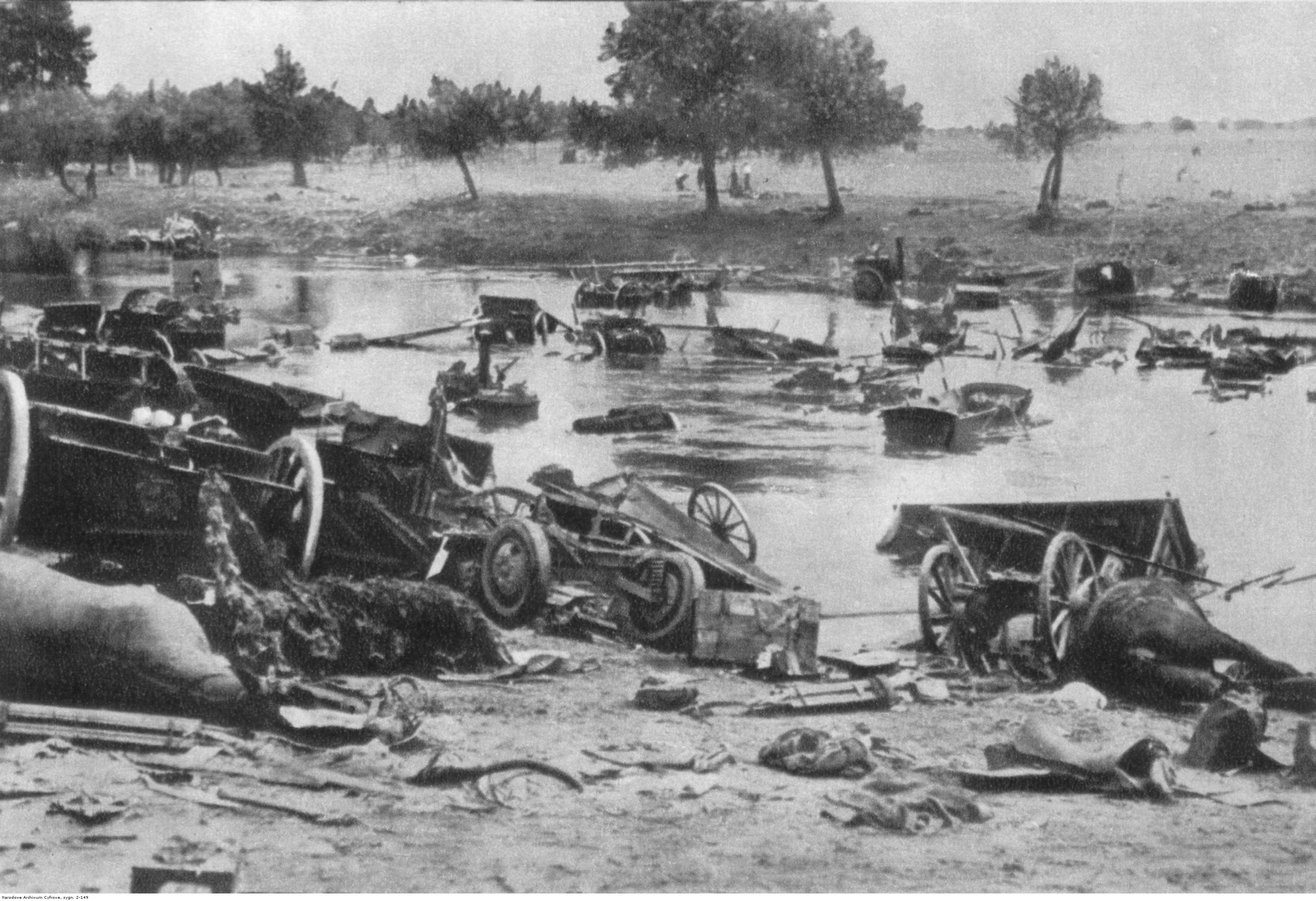 Zniszczony polski sprzęt wojskowy na brzegu Bzury.